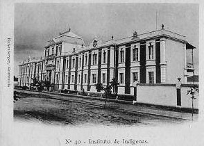 Escuela agrícola de Indígenas, construida por el gobierno del general José María Reyna Barrios.